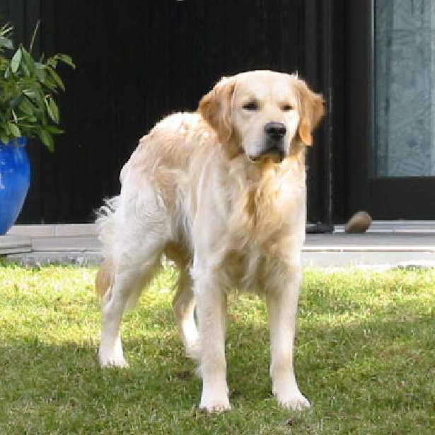 Golden Retriever Rüde